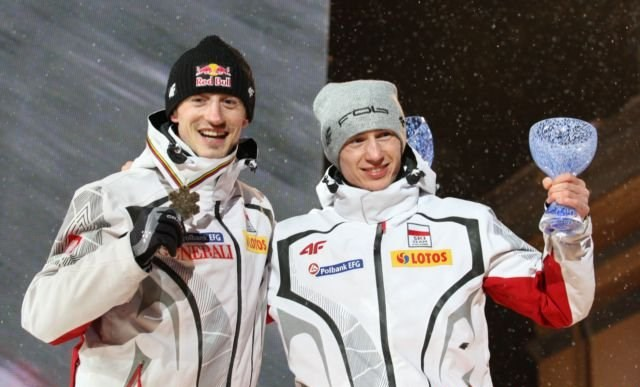 Adam Małysz i Kamil Stoch podczas ceremonii medalowej po konkursie indywidualnym na skoczni normalnej w ramach Mistrzostw Świata w Narciarstwie Klasycznym 2011 w Oslo.